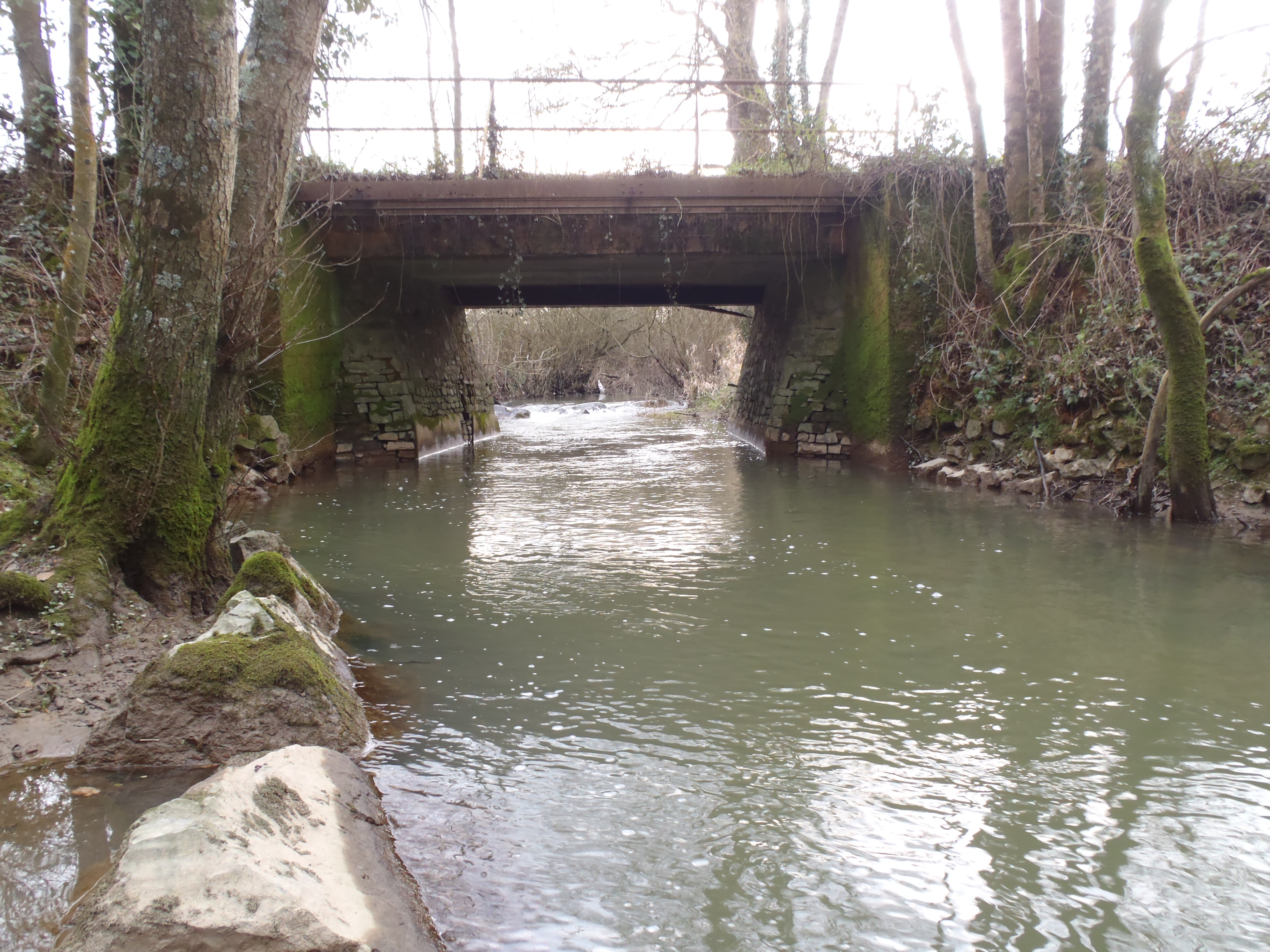 La Brutz sur la commune de Rougé